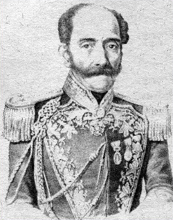 Retrato de Juan Gregorio de Las Heras